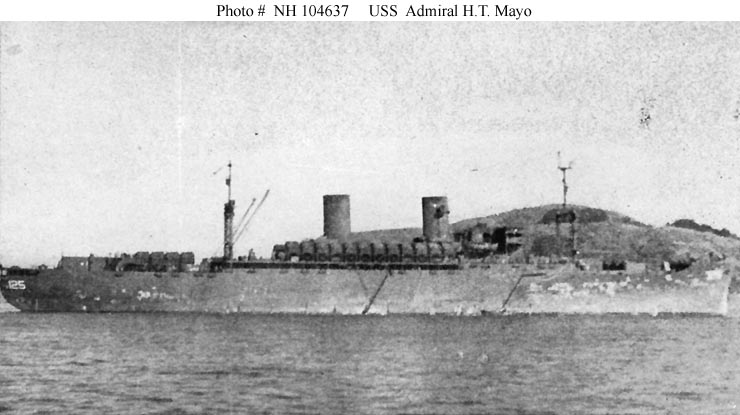 USS Admiral H T Mayo